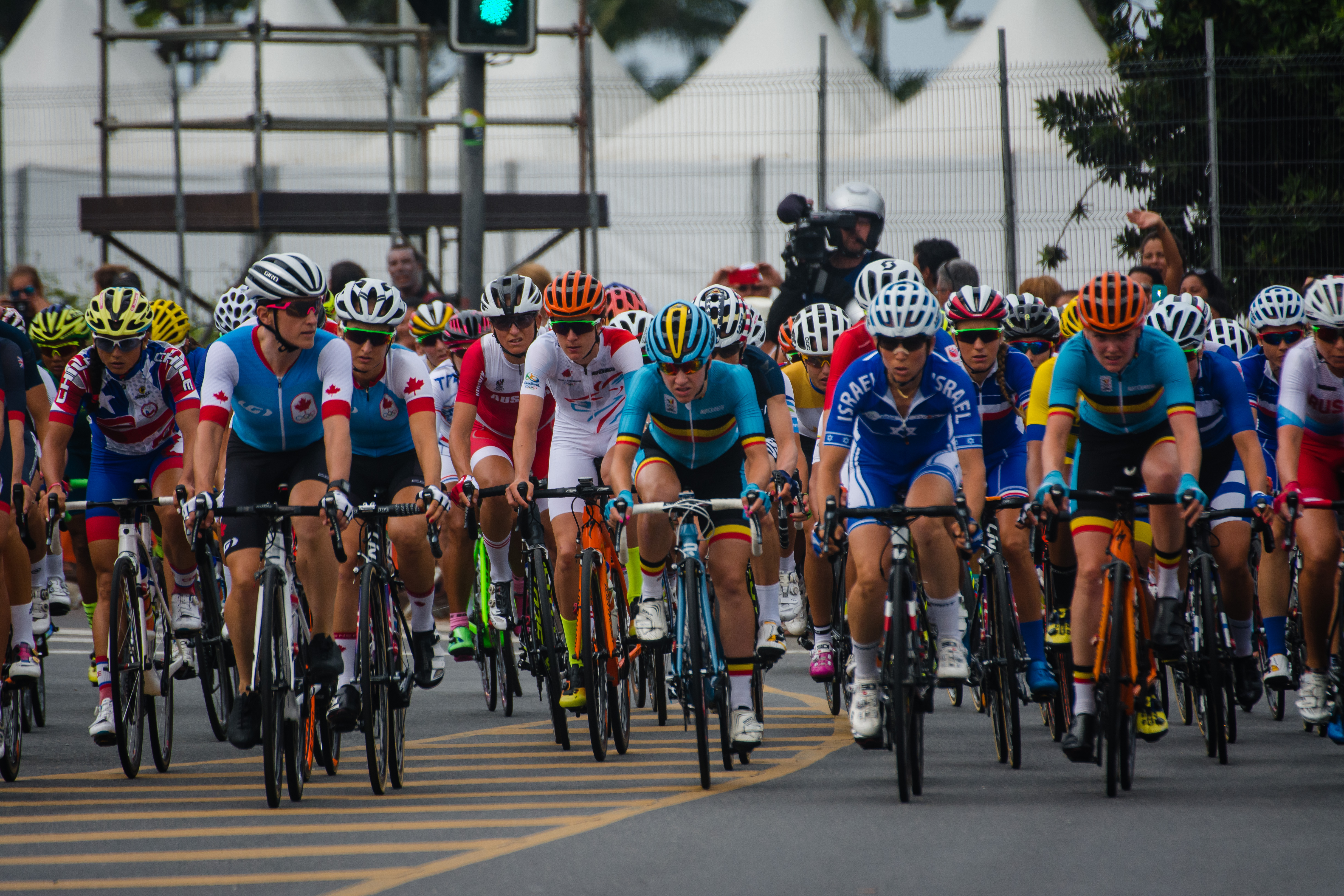 Passagem das ciclistas em frente à instalação olímpica do Pontal (Recreio, Rio de Janeiro). Prova disputada em 07/08/2016.